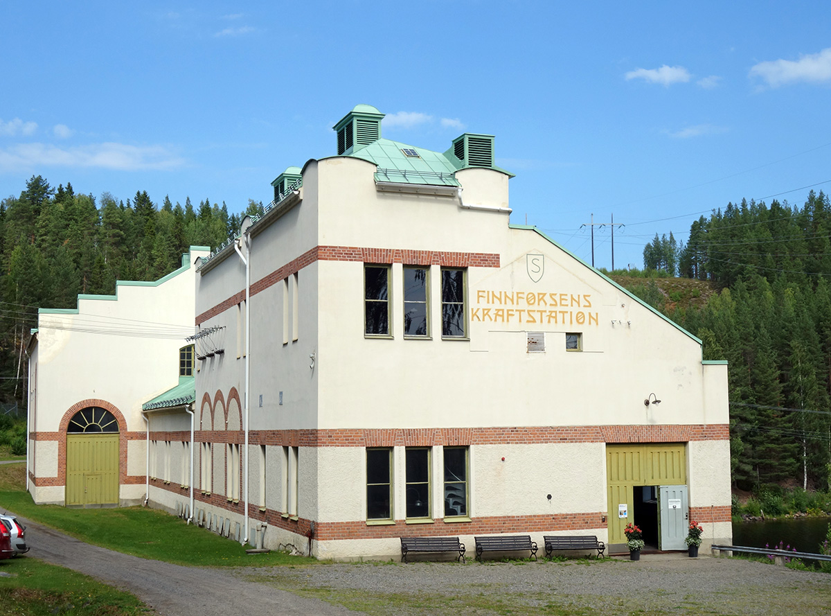 Finnfors gamla kraftverk i Skellefteälven, taget i bruk 1908. Numera byggnadsminne och museum.